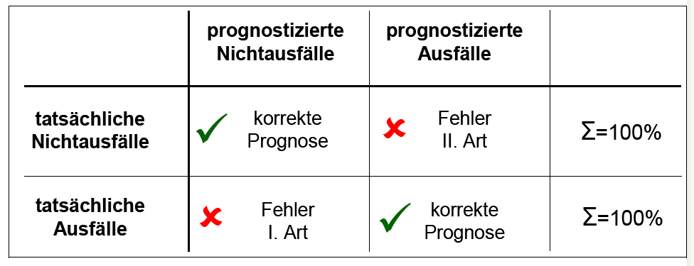 Kontingenztabelle, BEMMANN, M. (2005): "Verbesserung der Vergleichbarkeit von Schätzgüteergebnissen von Insolvenzprognosestudien",in Dresden Discussion Paper Series in Economics 08/ 2005, (8.11.2006), 2005, S. 9